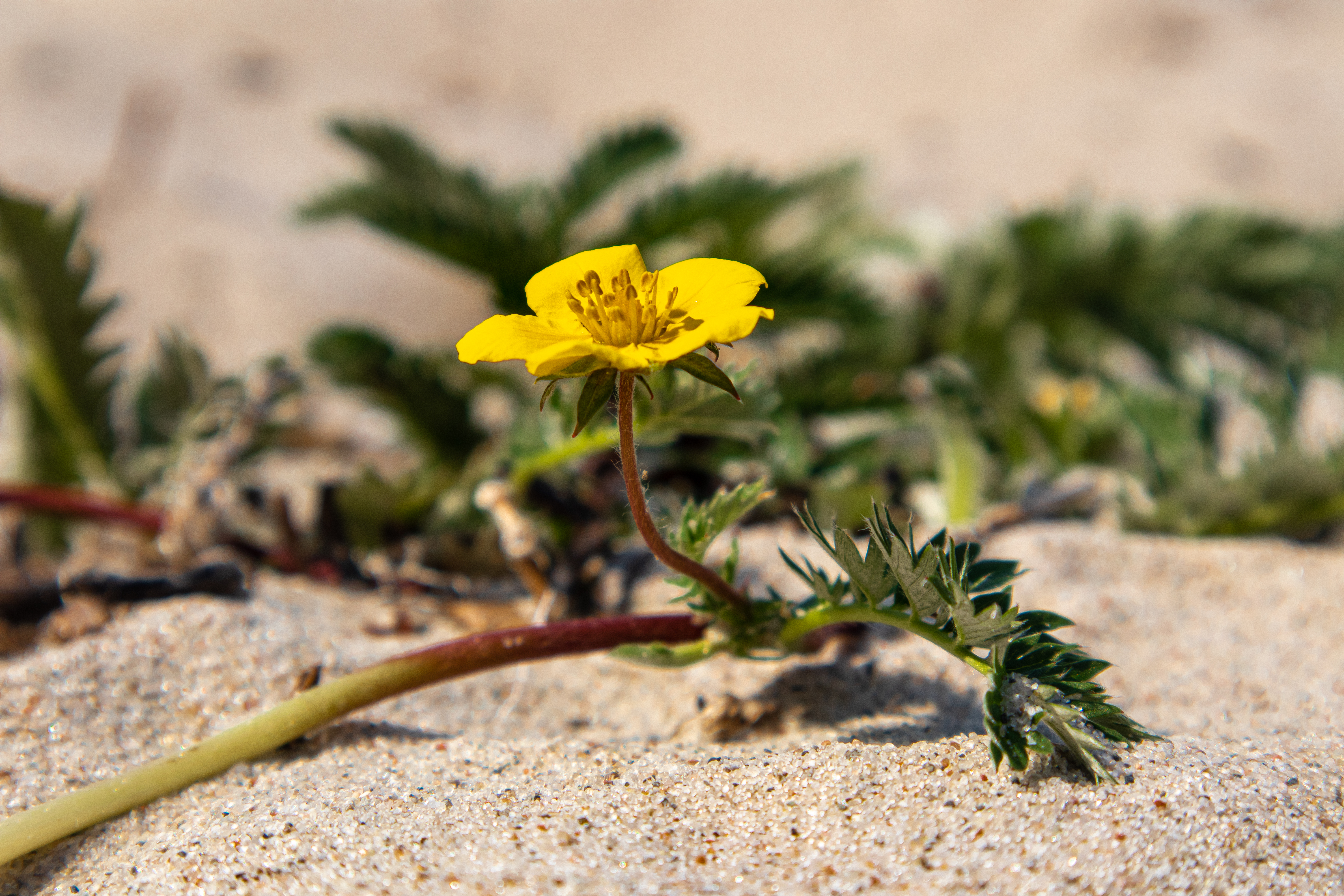 Gänsefingerkraut